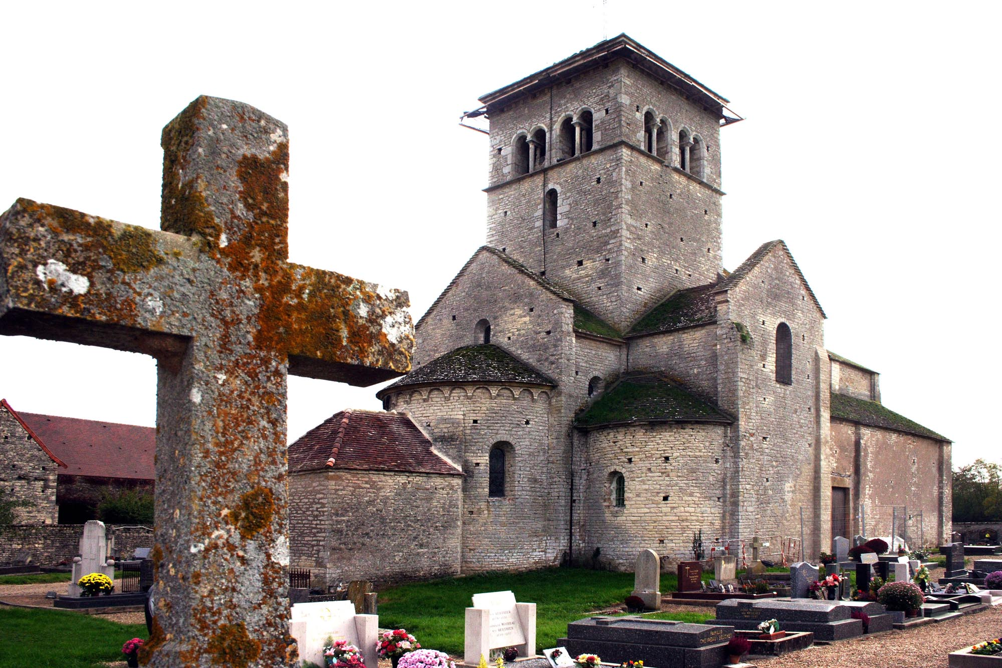 Église de Malay, Saône et Loire, France